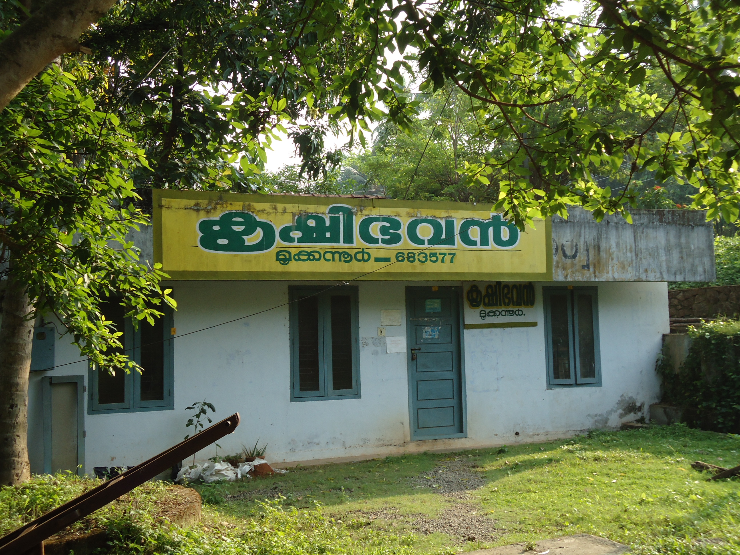 Krishi Bhavan Mookkannoor